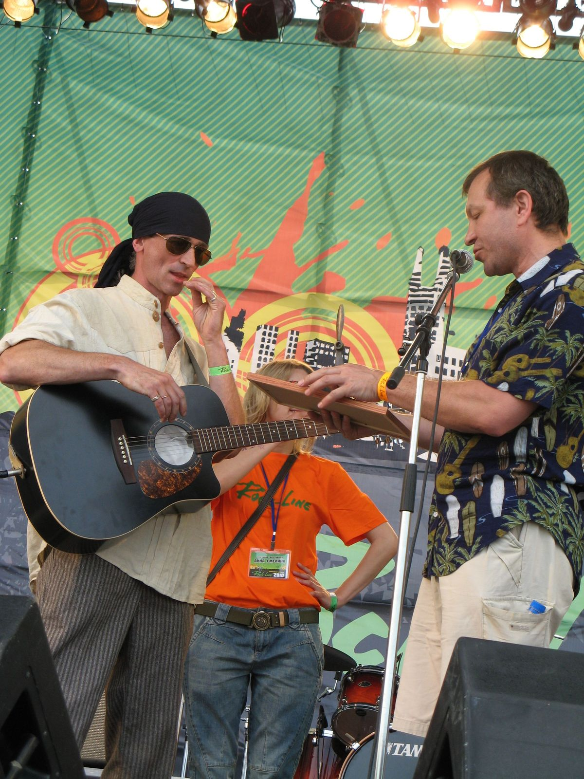 Группа "Лаборатория Ветра" на фестивале "Rock-Line 2010"